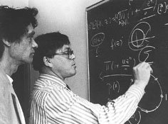 Photographie montrant Gilles Roussi au travail à l'École Polytechnique.